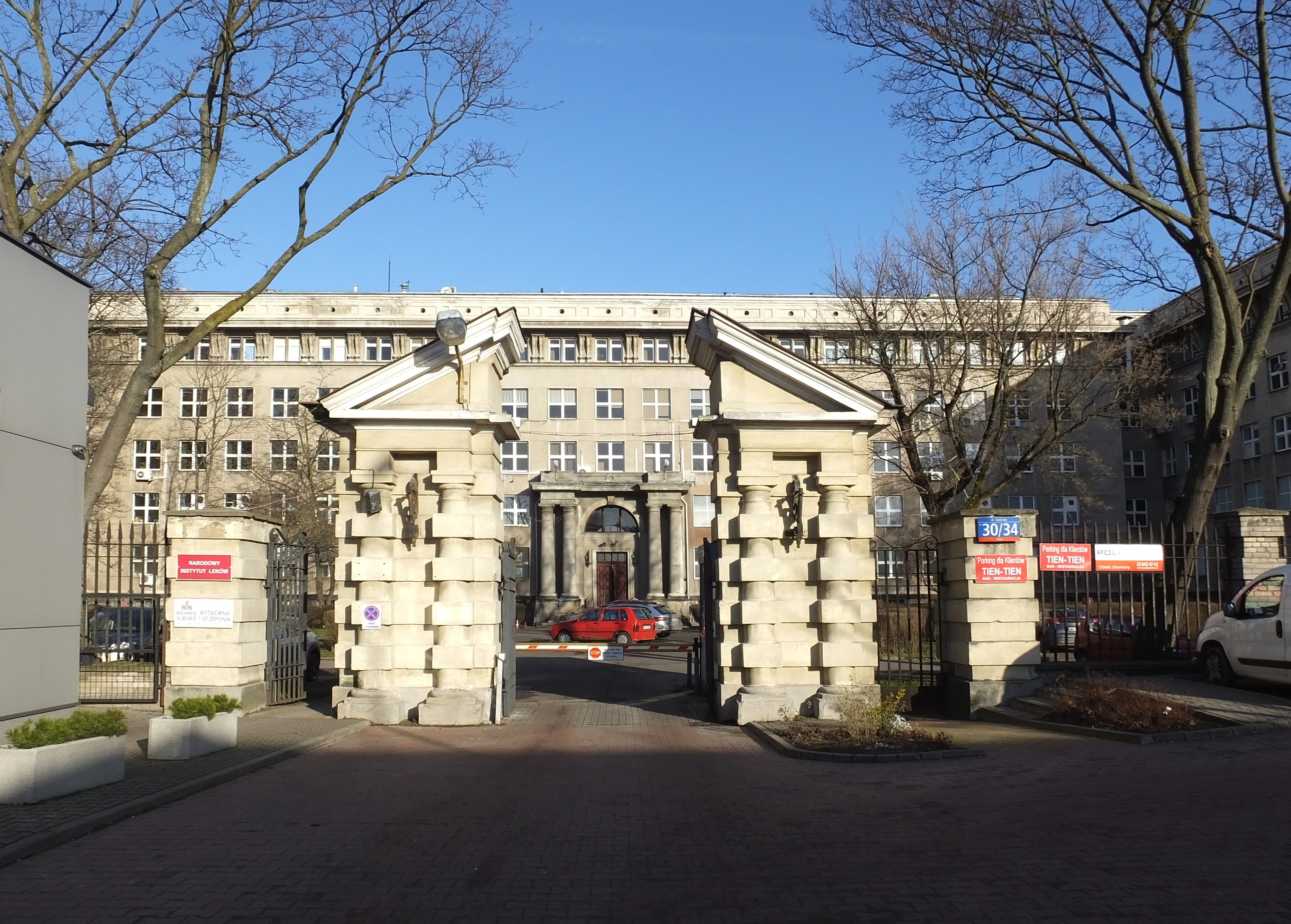 Narodowy Instytut Leków, Warszawa